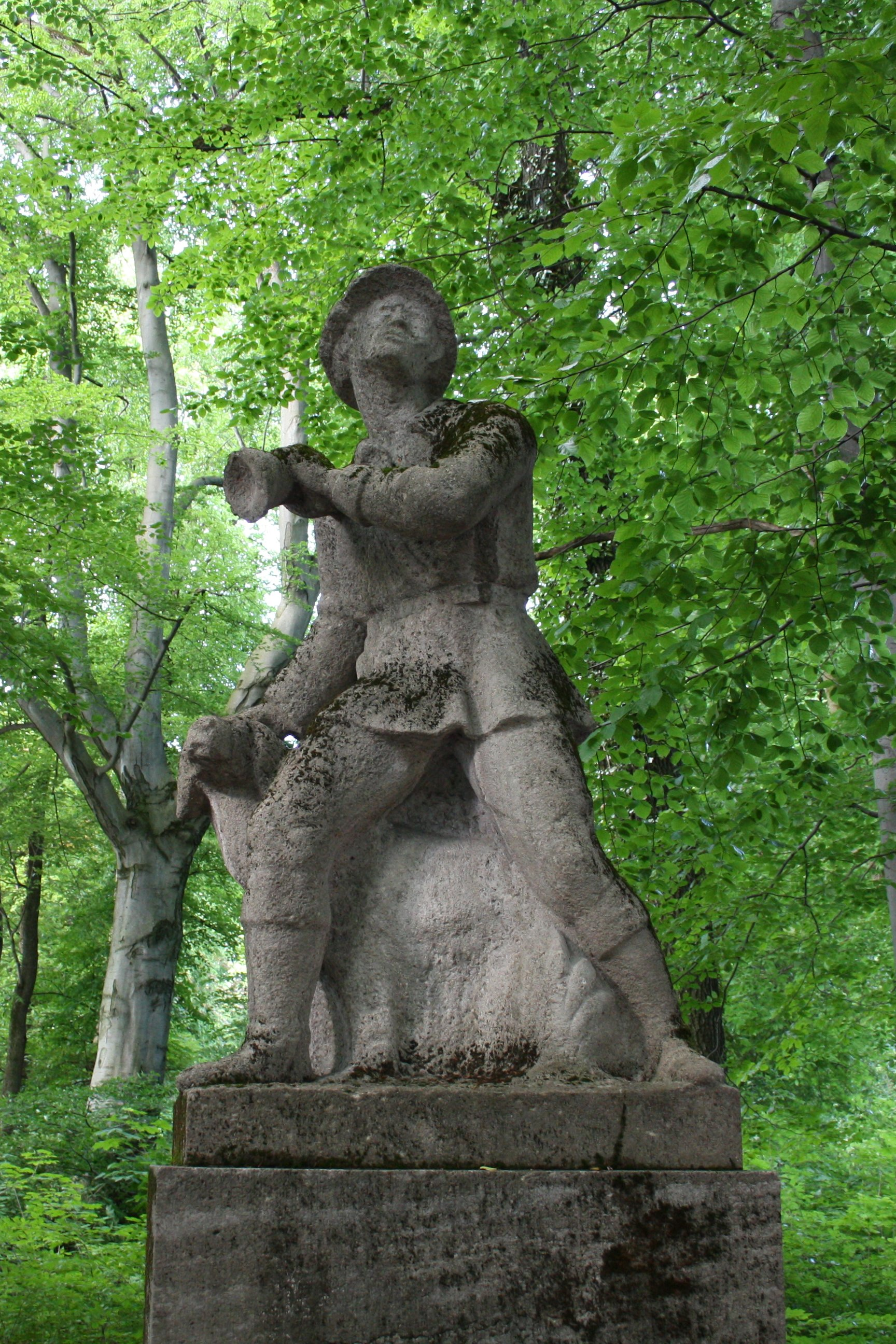 Steinfigur eines Jägers mit Hund, 1. Hälfte 20. Jh., Herzog-Albrecht-Anlage, München